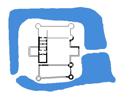 Plan zamku w Wyszynie